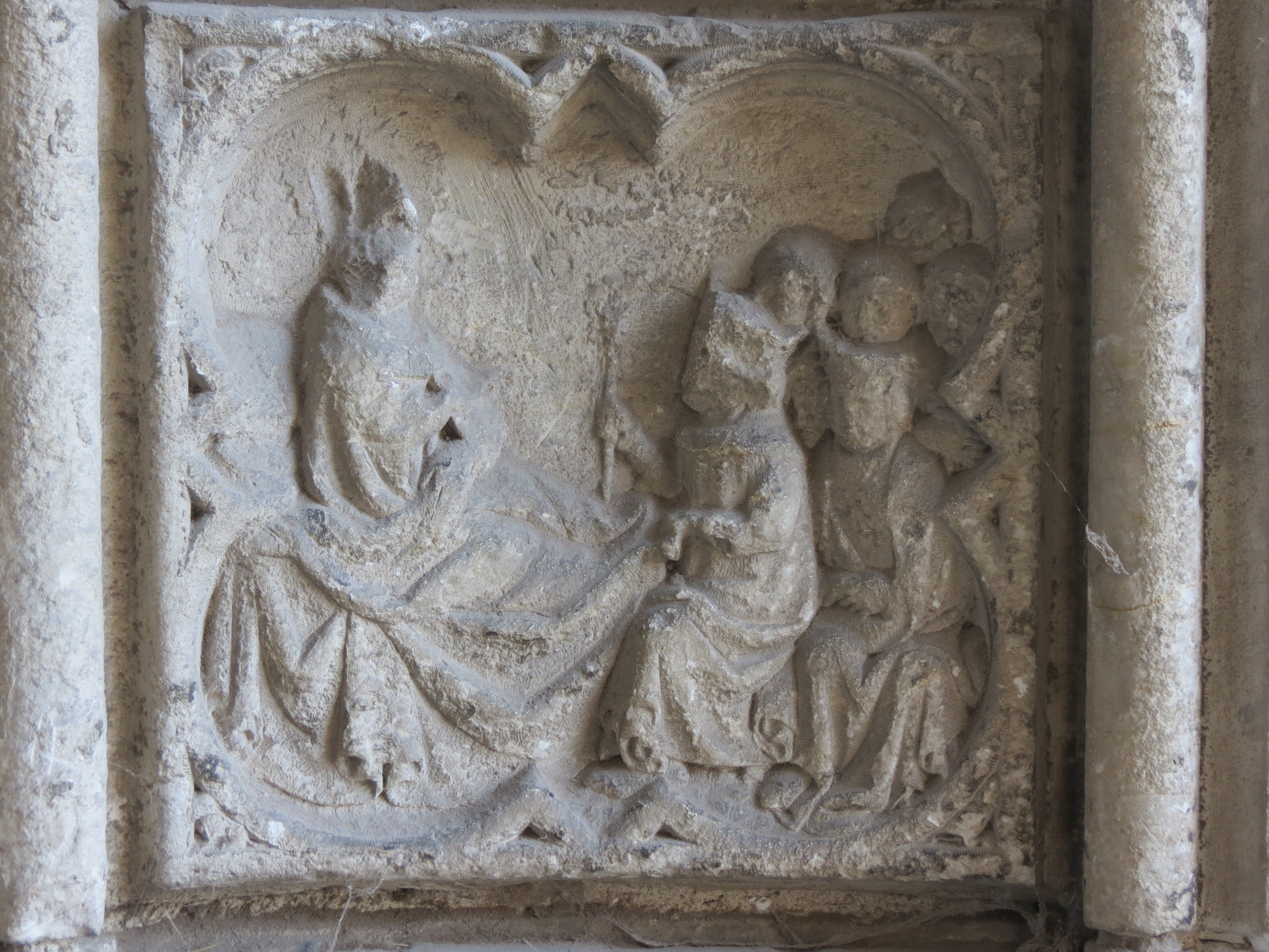 Détail du 15e médaillon du portail des Marmoussets dont la lecture est en boustrophédon représentant Ouen, assis sur son lit de mort, face au roi Thierry III et la reine agenouillés, accompagnés de quatre autres personnes.